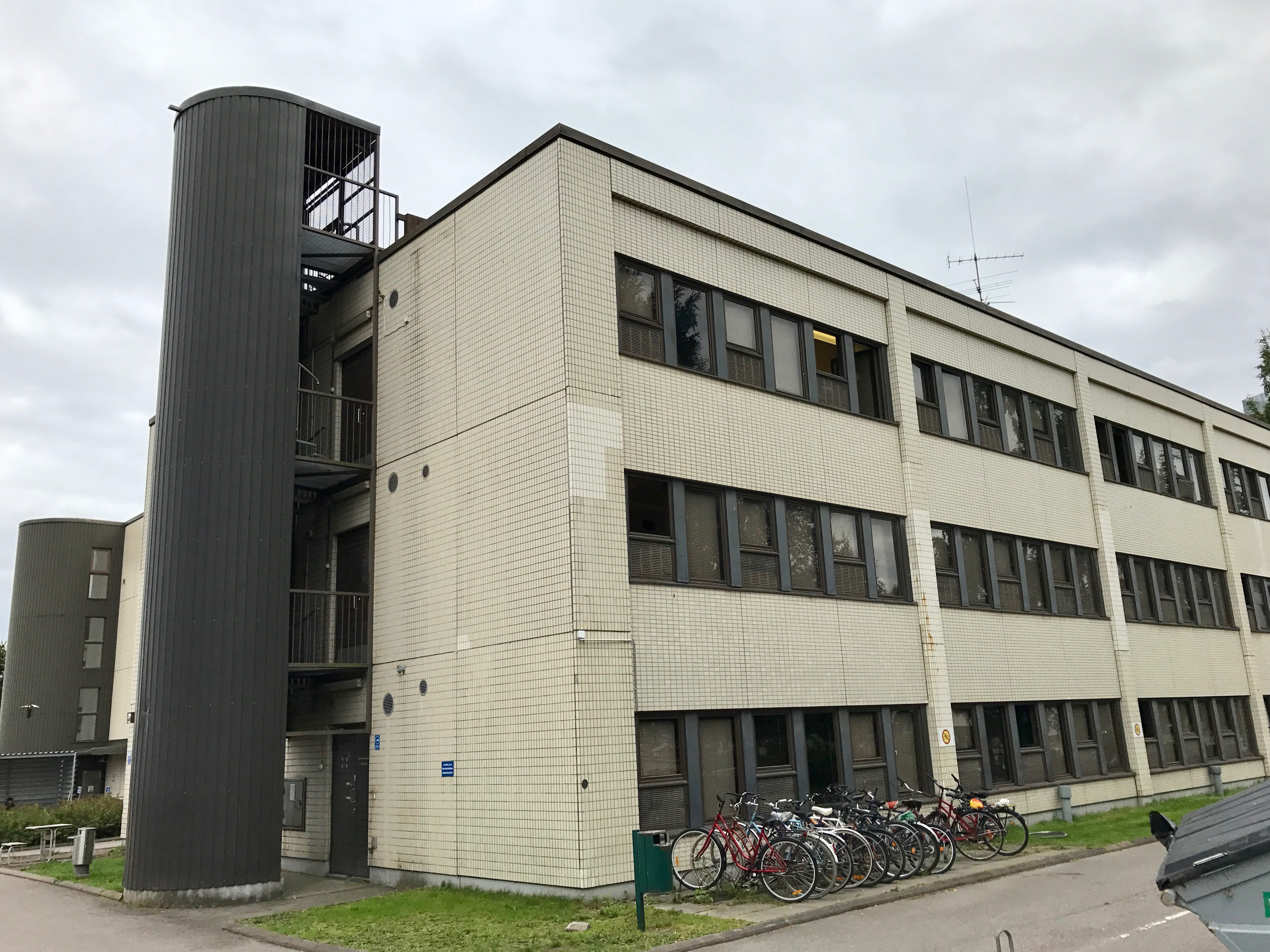 Robert Huberin tien vastaanottokeskus on yksityisen Luona Oy:n ylläpitämä turvapaikanhakijoiden vastaanottokeskus Vantaalla.